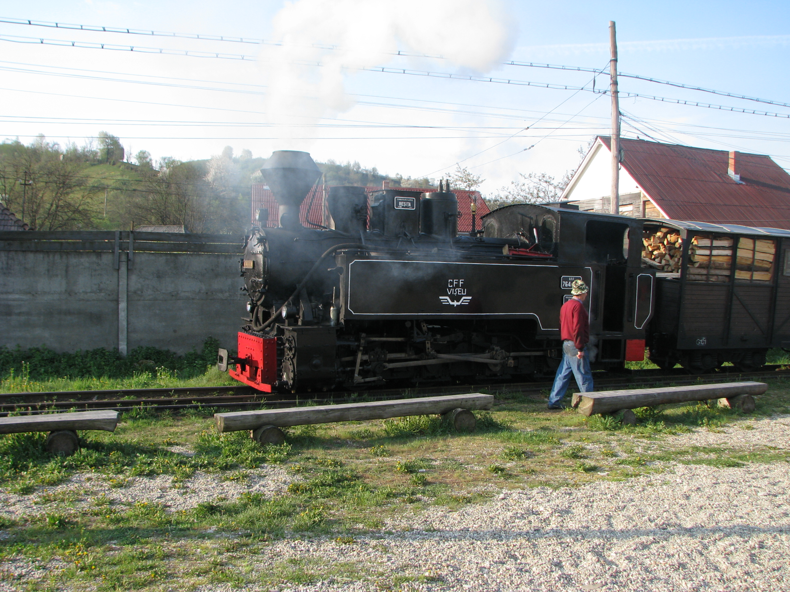 Locomotiva cu abur 764.421_Elveția pe linia mocăniței de pe Valea Vaserului